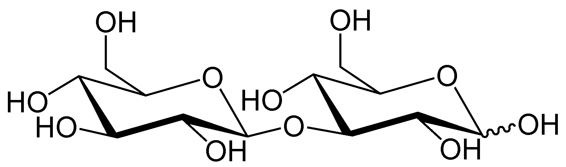 Laminaribiose